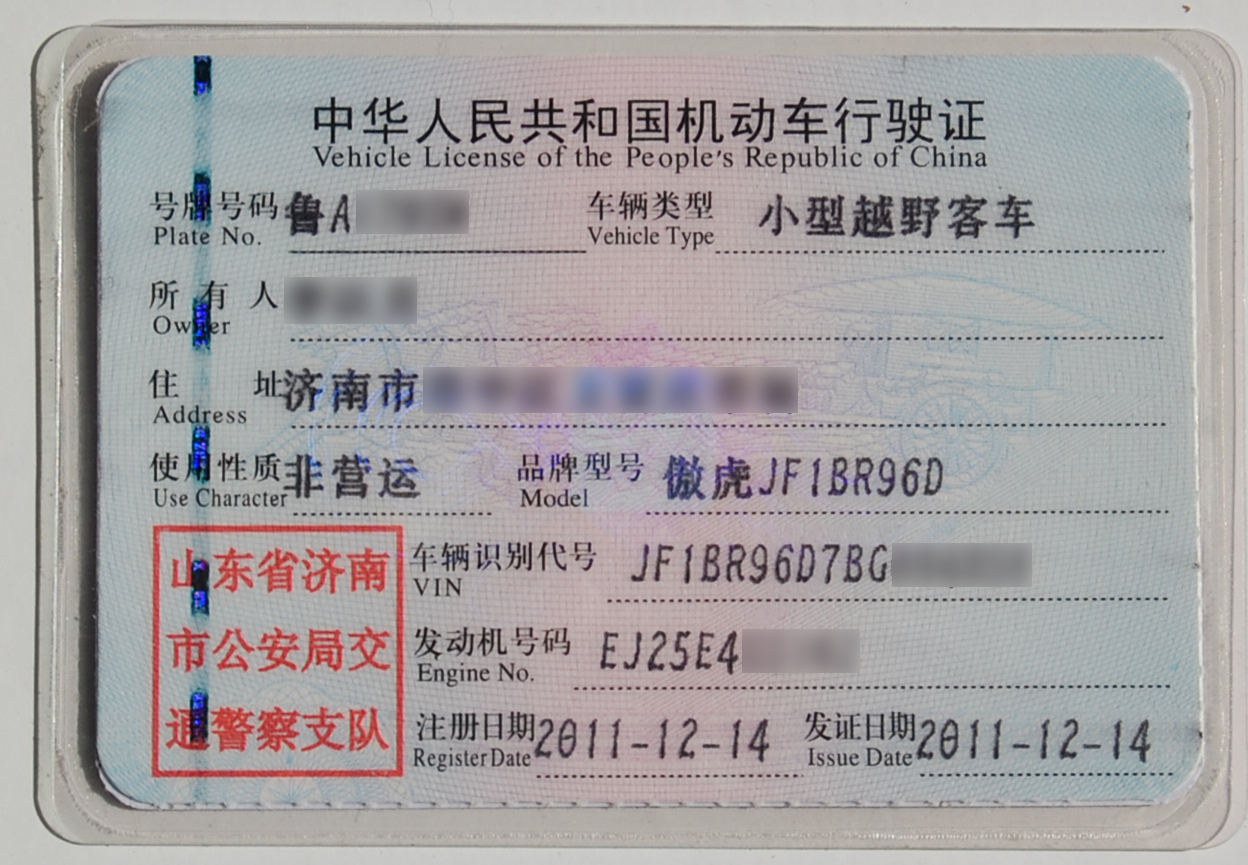 中华人民共和国机动车行驶证（信息页）